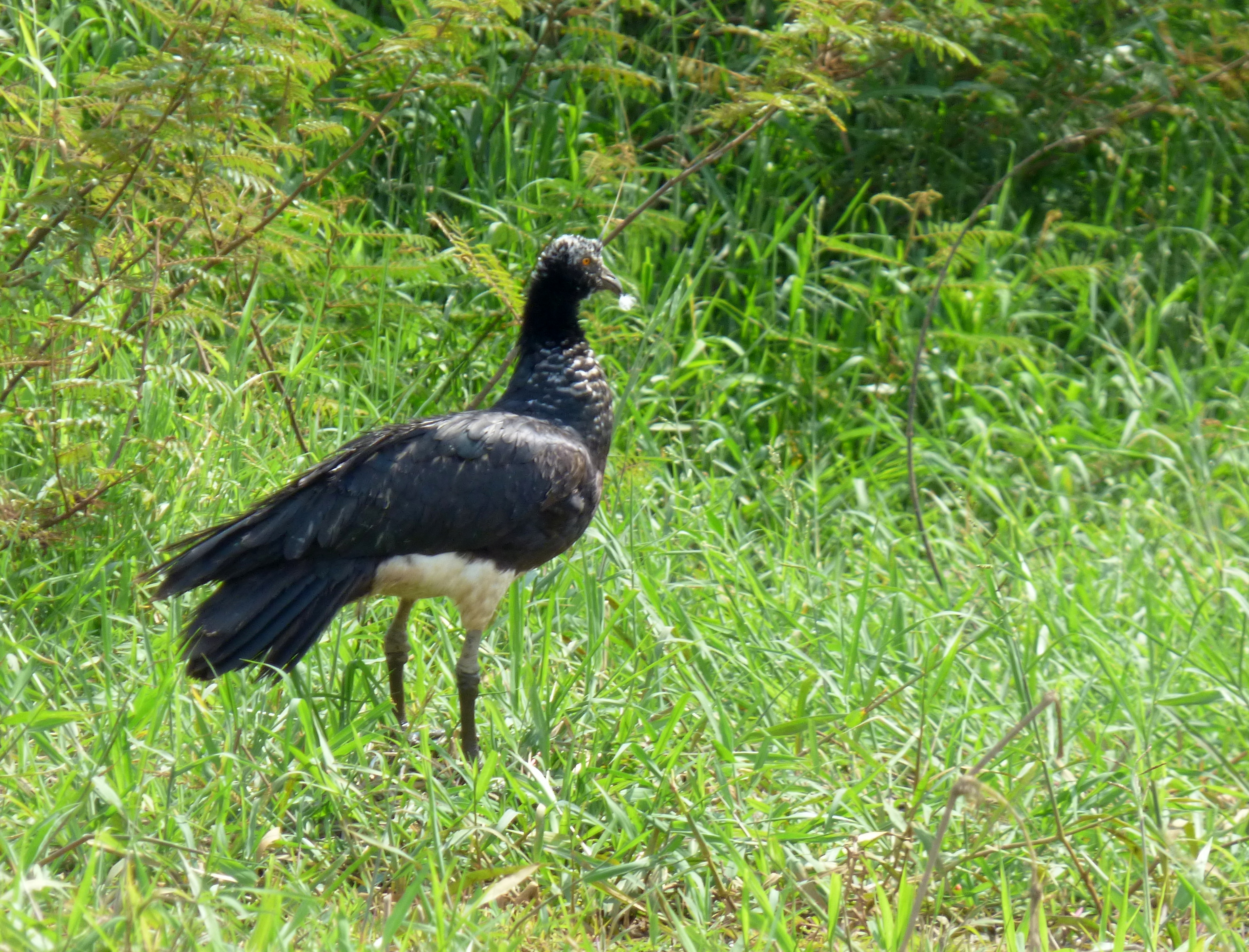 Anhima cornuta (Buitre de ciénaga)